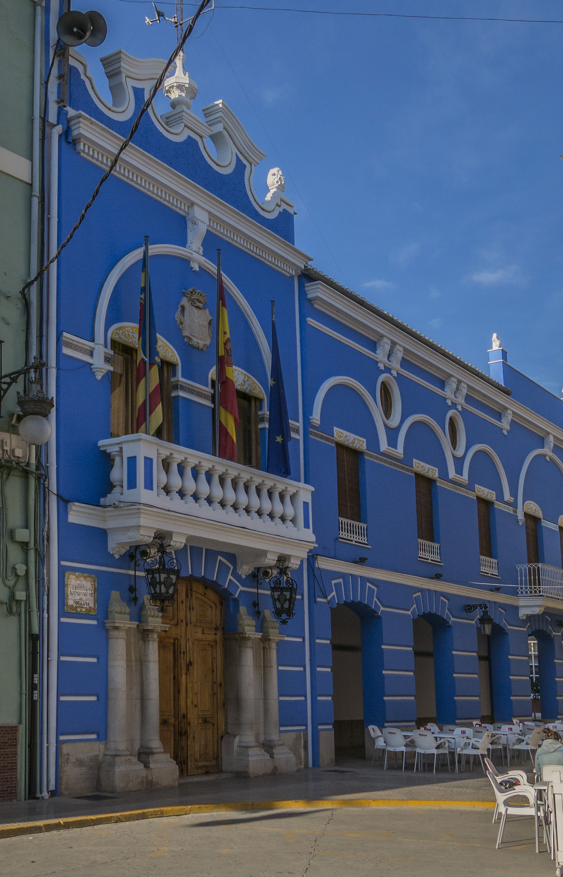 Sollana és un municipi valencià, situat a la comarca de la Ribera Baixa i enclavat dins del Parc Natural de l'Albufera.